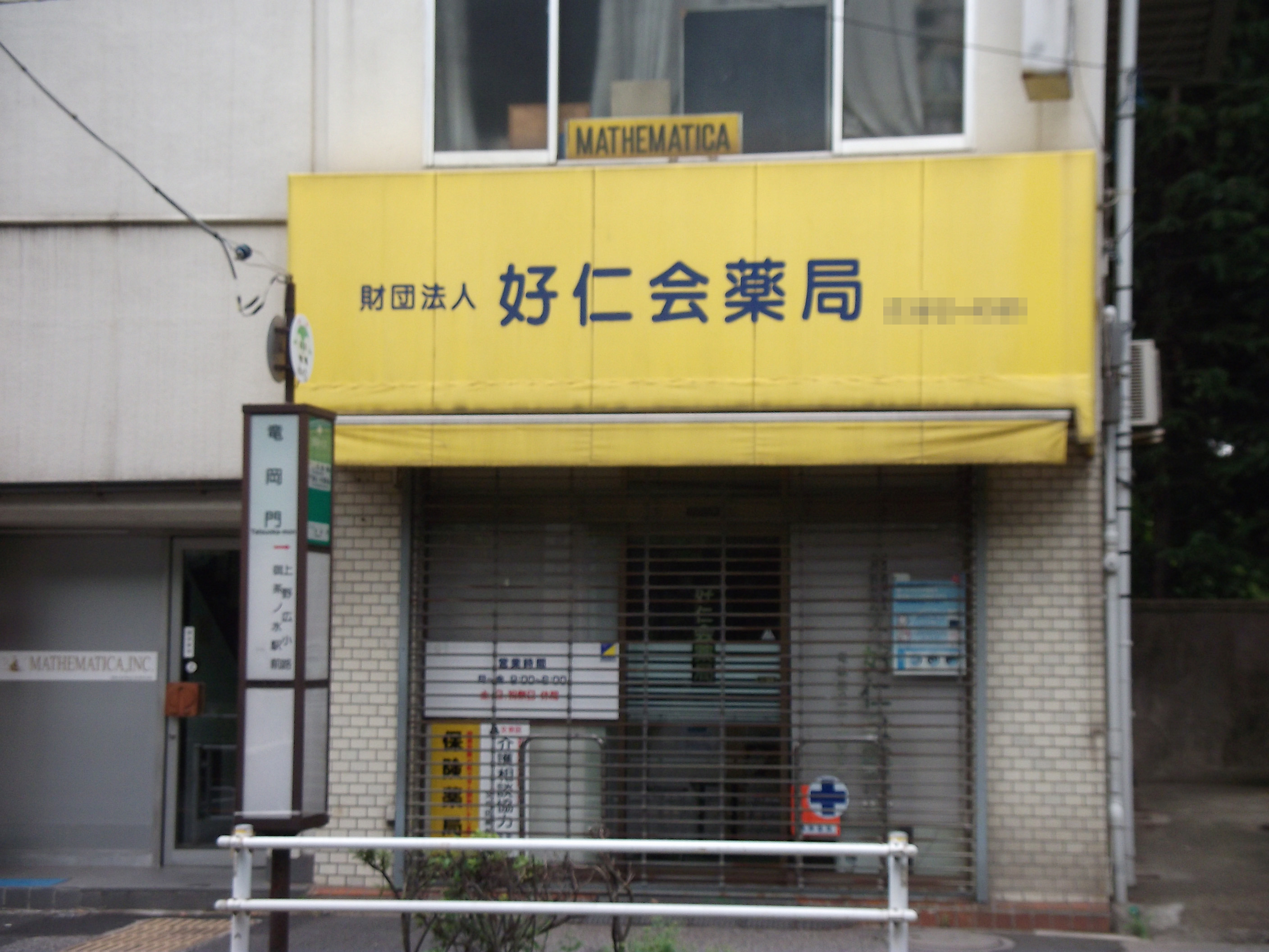 好仁会薬局（東京都文京区本郷）。